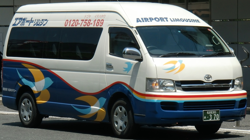 知多つばめタクシーのエアポートリムジン